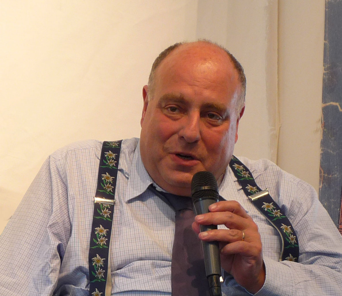 Alexandre Adler au cours d'une Conversation dans une librairie de Strasbourg